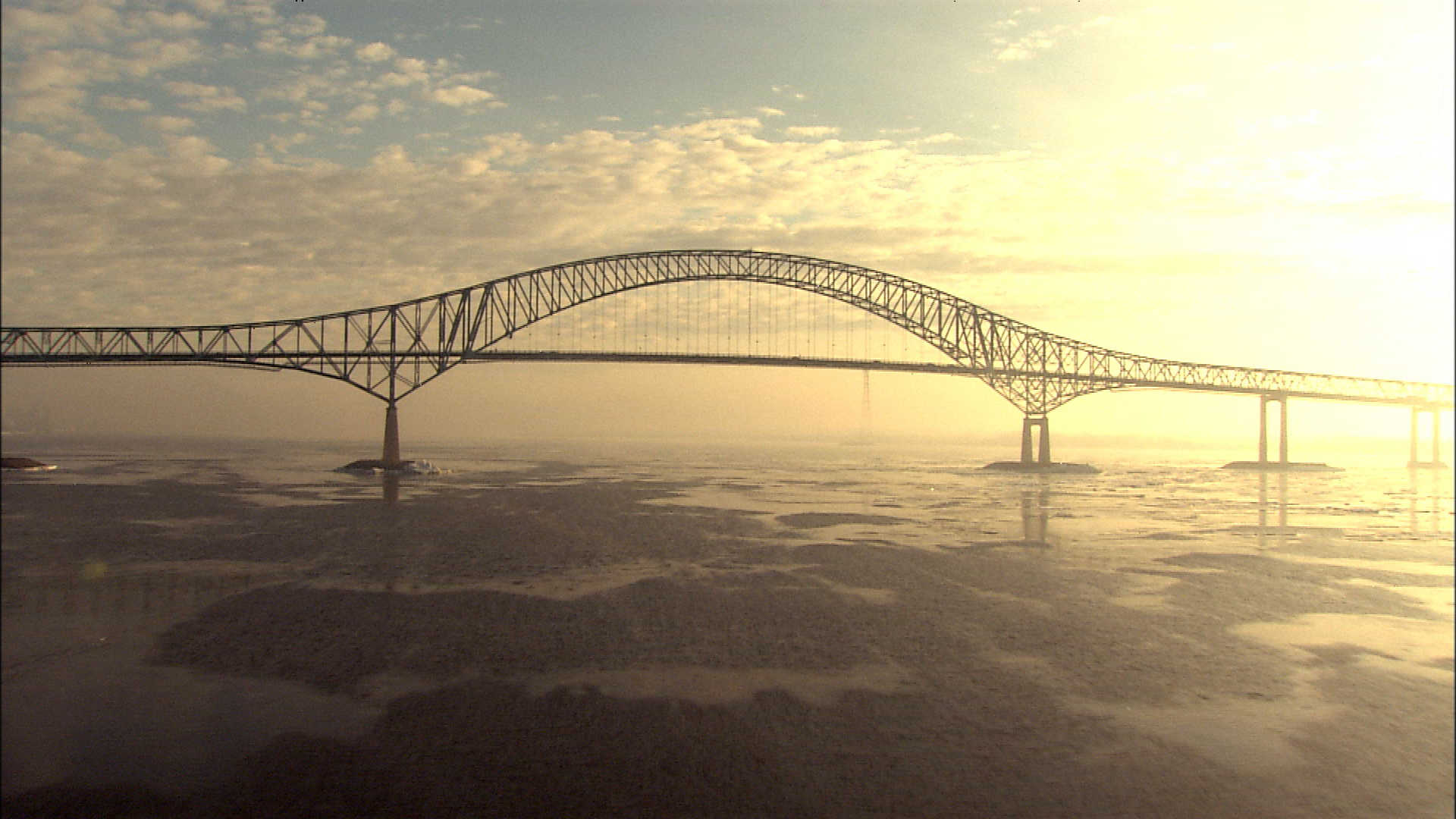 Paysage hivernal de la Mauricie / Winter landscape in Mauricie, Québec (Canada)